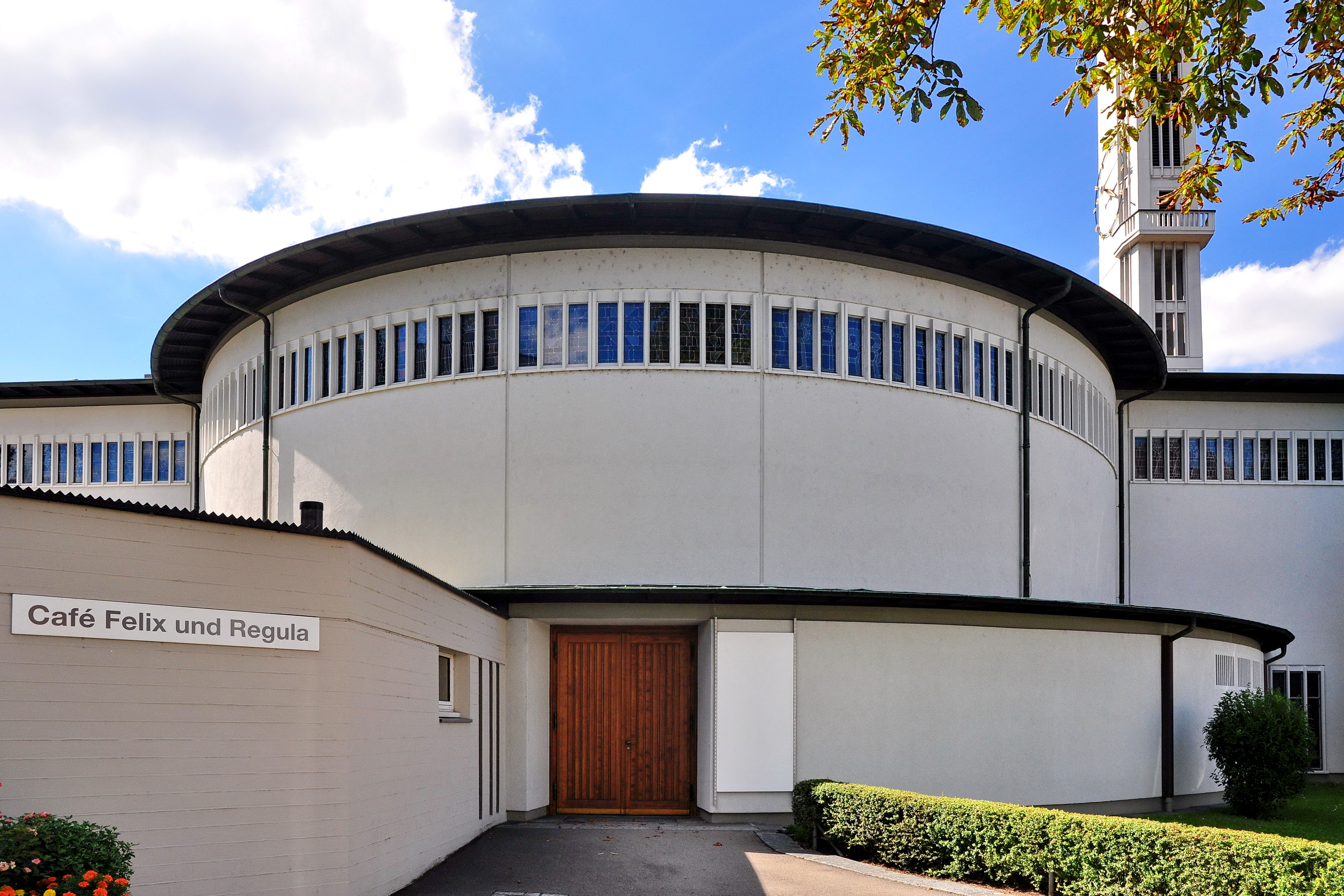 Katholische Kirche Felix und Regula in Zürich-Hard (Switzerland)